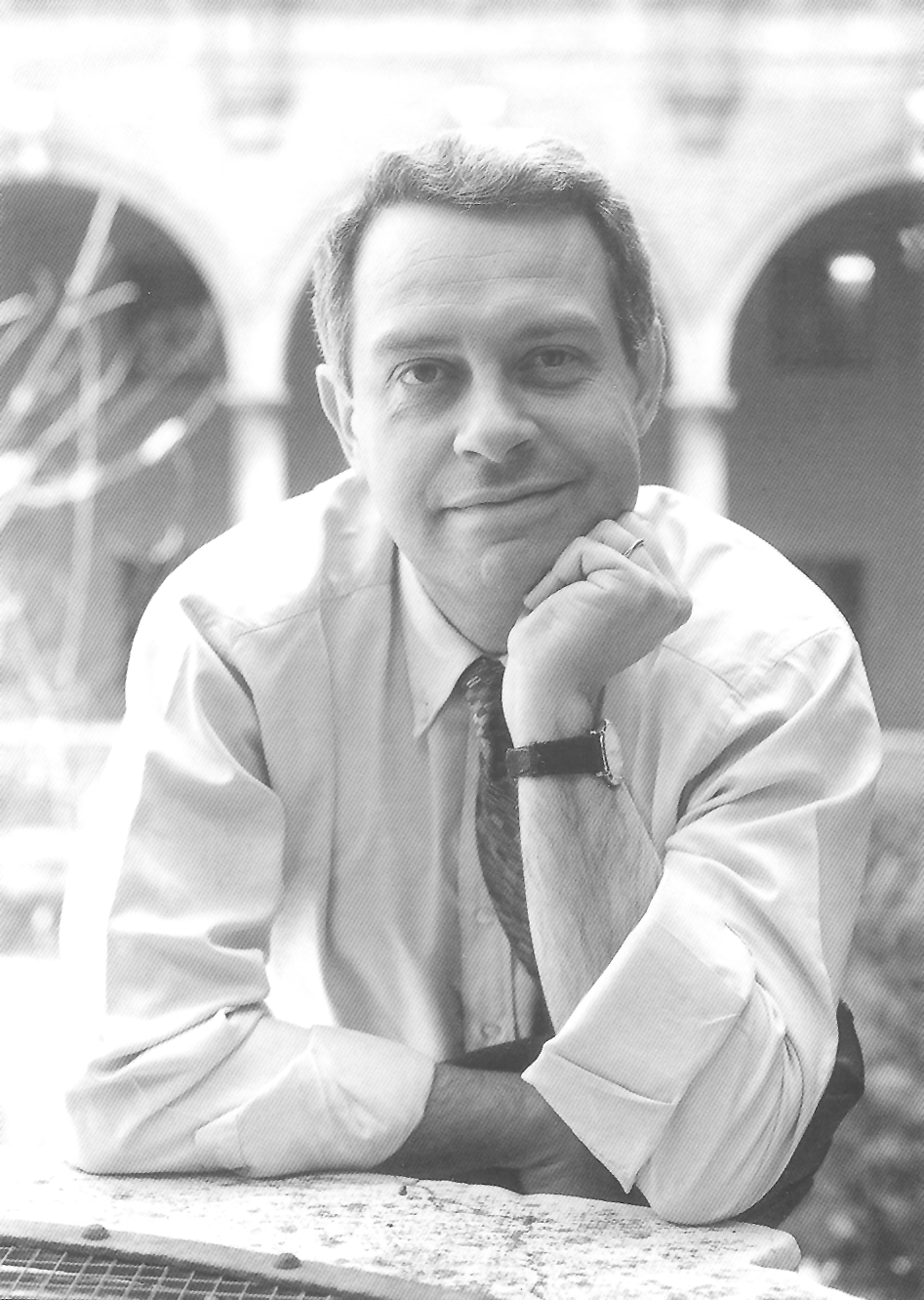 Immagine di Pier Paolo D'Attorre, storico e Sindaco di Ravenna. (Foto di Fabrizio Zani 1993)